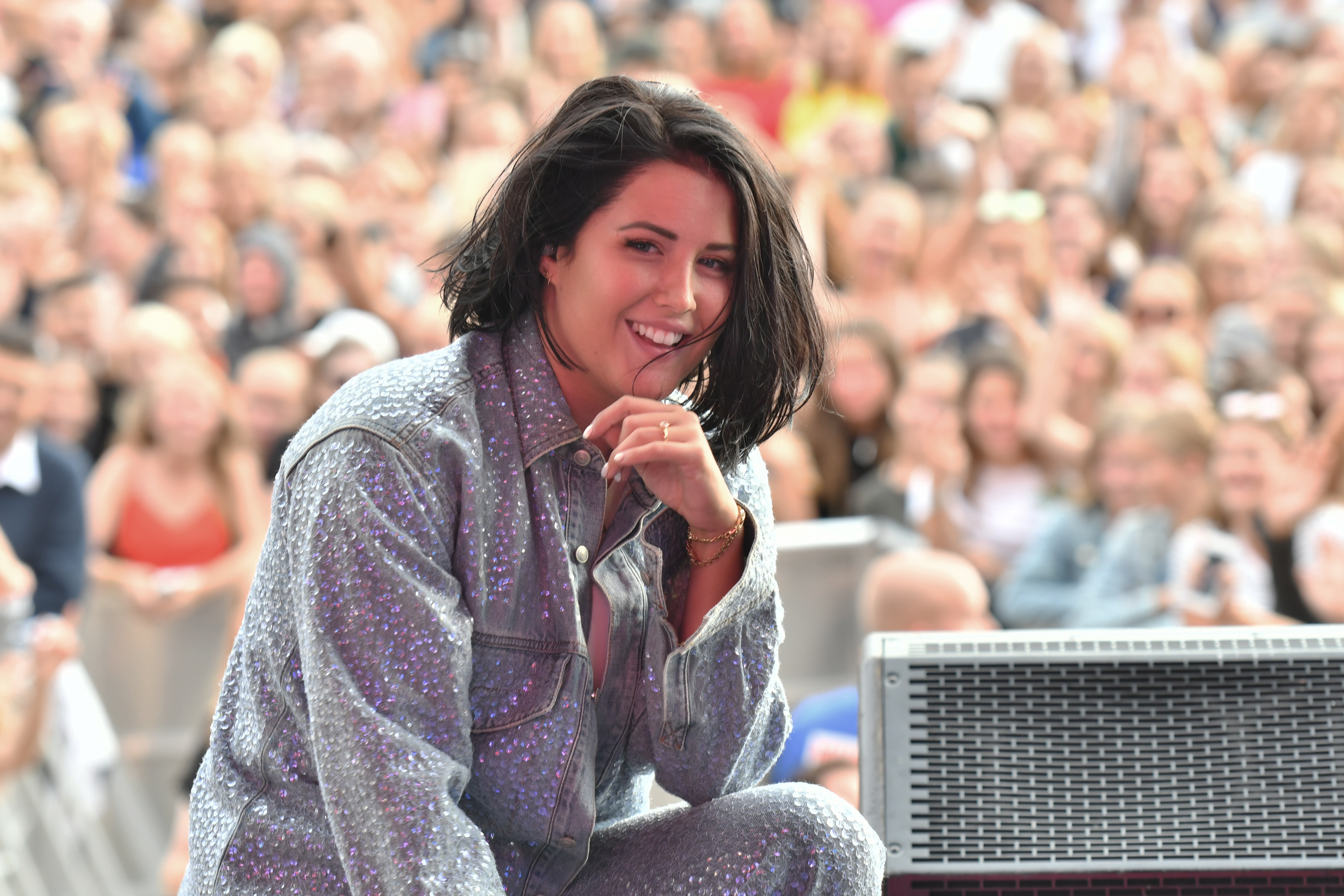 Molly Sandén på Malmöfestivalen, som del av NRJ in the Park.